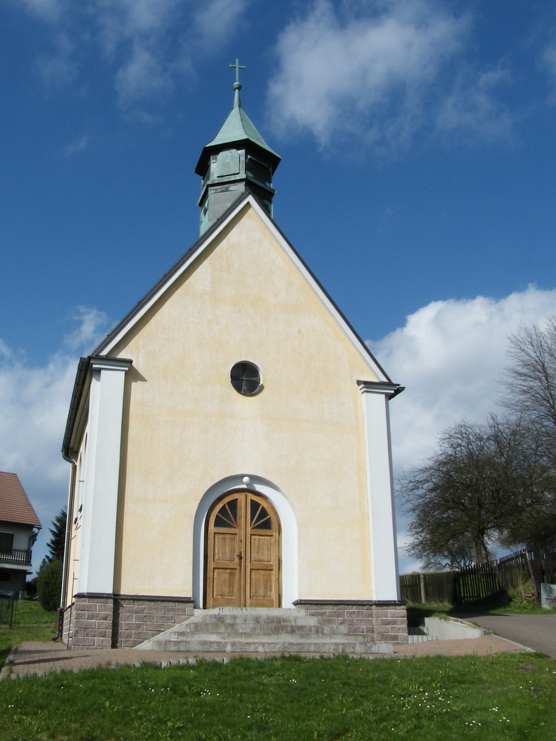 Kaple sv. Antonína Paduánského (Dobrošov)